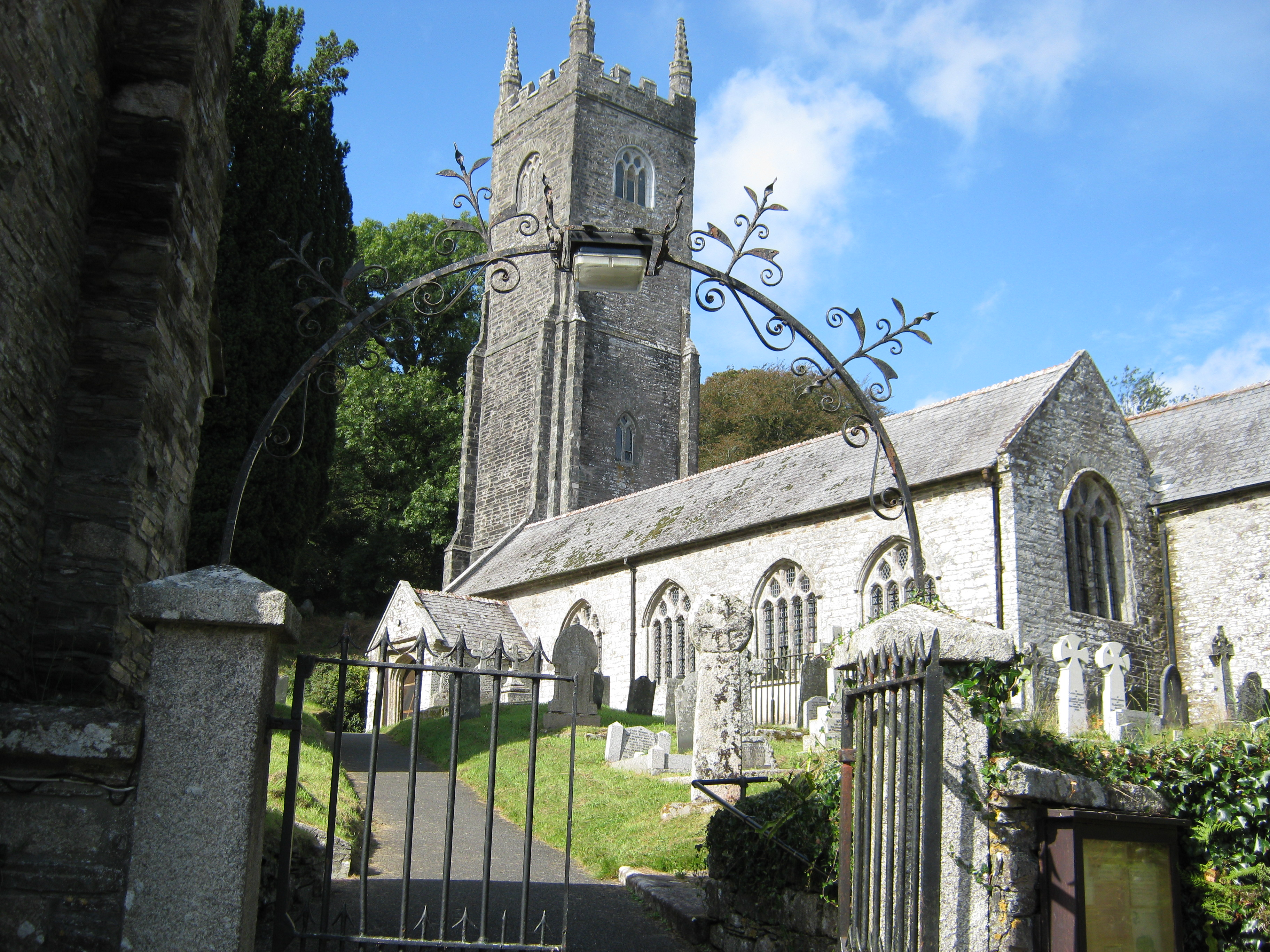 St. Nonna, Altarnun.